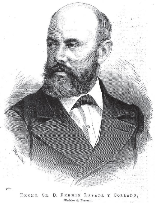 Retrato de Fermín Lasala y Collado